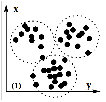 Կլաստերներ